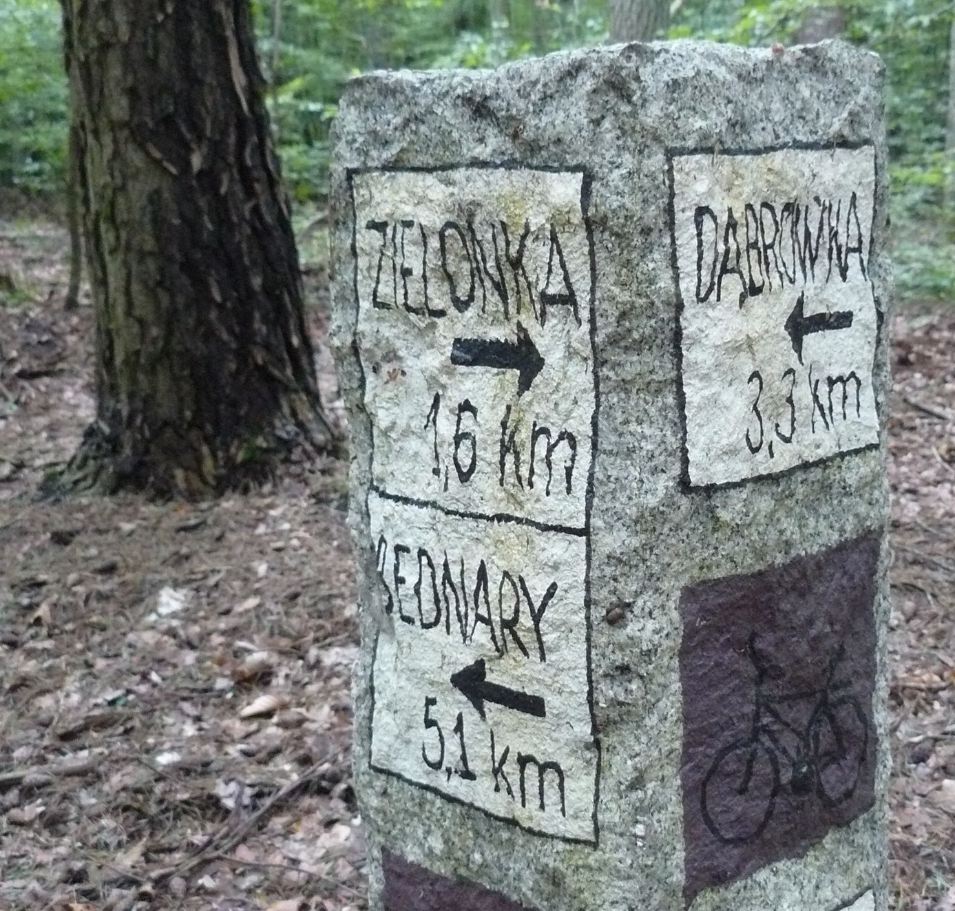 Trakt bednarski, Puszcza Zielonka.